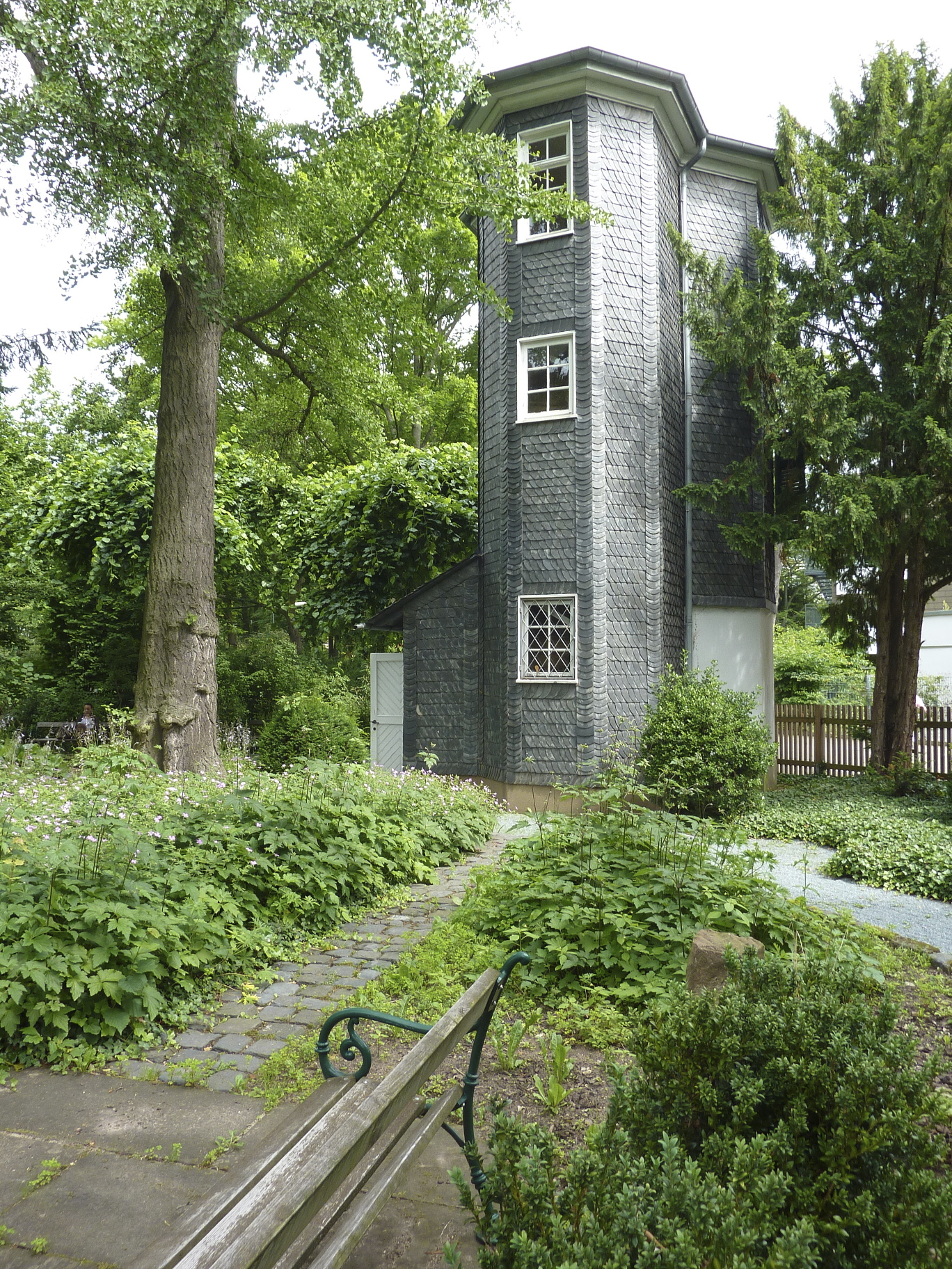 Frankfurt am Main, Stadtteil Sachsenhausen: Das Willemer-Häuschen oder Willemer-Gartenhaus ist ein klassizistisches Gartenhaus aus dem frühen 19. Jahrhundert. Bekannt wurde es durch die dortigen Begegnungen des Dichters Johann Wolgang von Goethe mit Marianne von Willemer im Jahr 1814. Im Zweiten Weltkrieg wurde das Originalgebäude zerstört und anschließend am selben Ort originalgetreu wieder aufgebaut. Heute befindet sich im Haus eine Goethe-Gedenkstätte. Das Foto zeigt die Rückseite des Gebäudes mit angebautem Treppenhaus. Ansicht von Südwesten, gesehen vom Willemerschen Garten aus. Links im Bild einer der beiden hinter dem Haus stehenden Ginkgobäume (Ginkgo biloba).